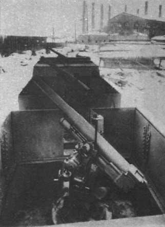 76мм зенитки красного бронепоезда номер 44